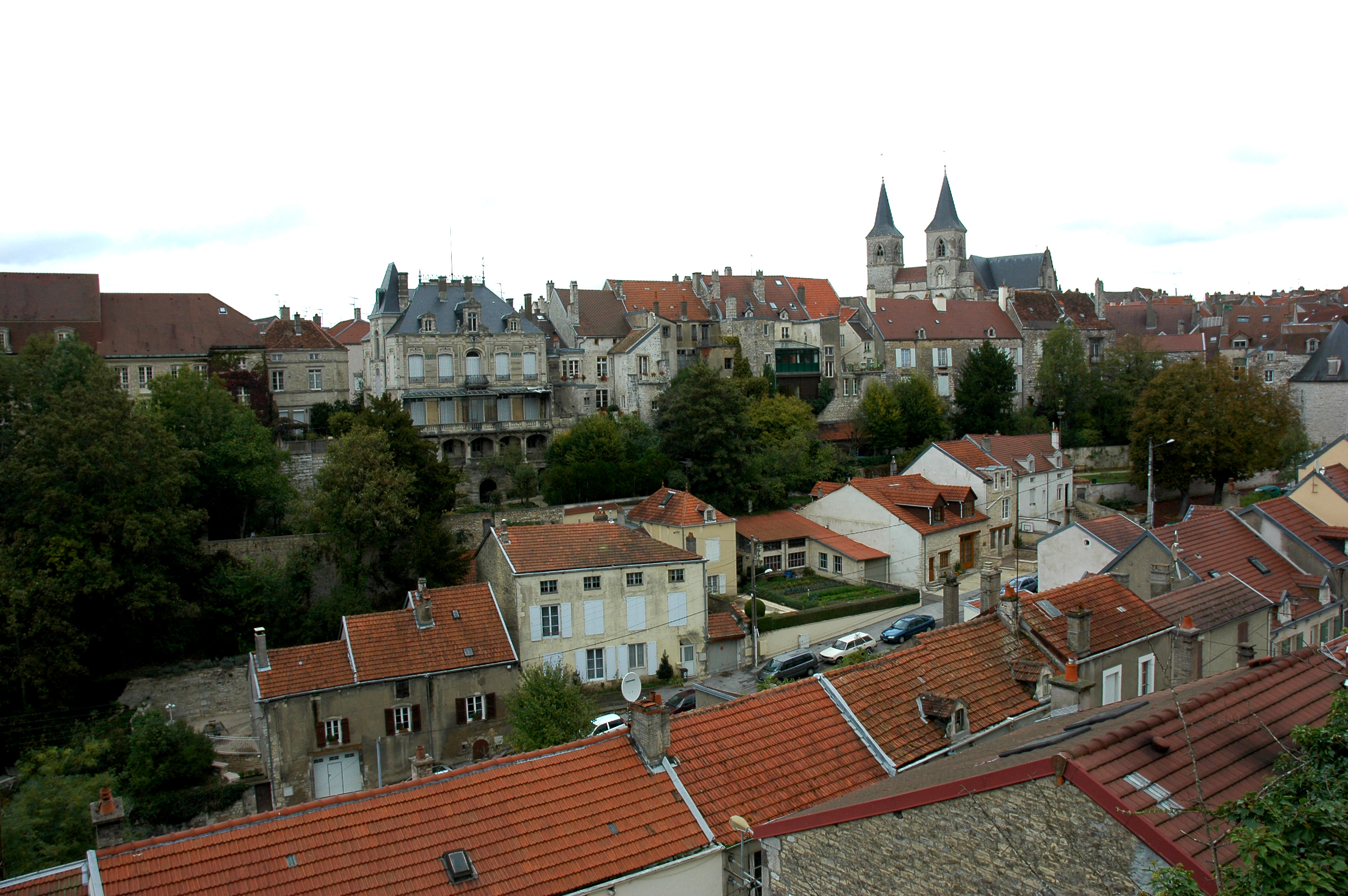 Chaumont, Haute-Marne, France.